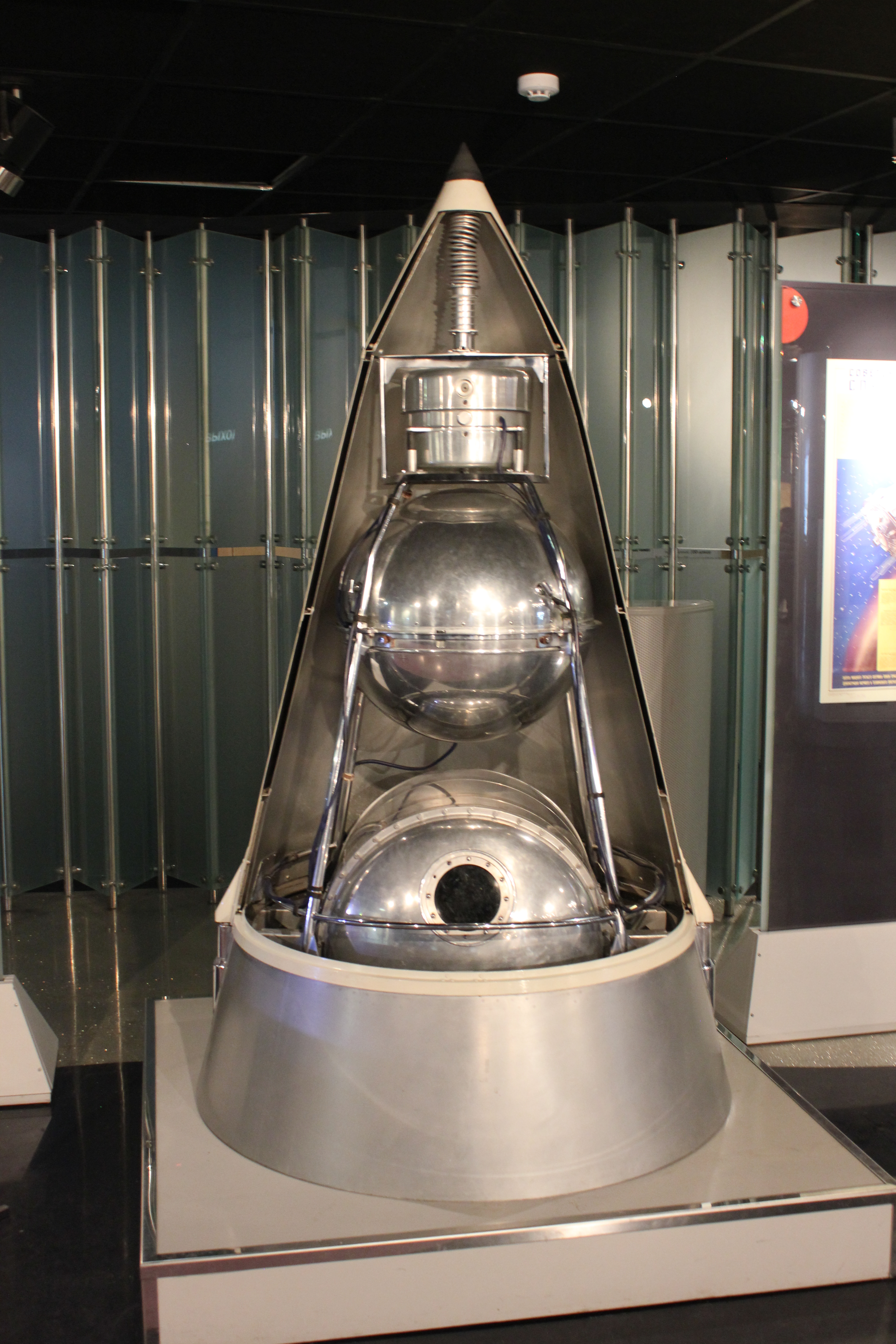 Laika's spacecraft.